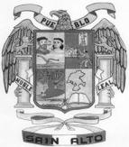 Escudo de Sain Alto, Zacatecas.